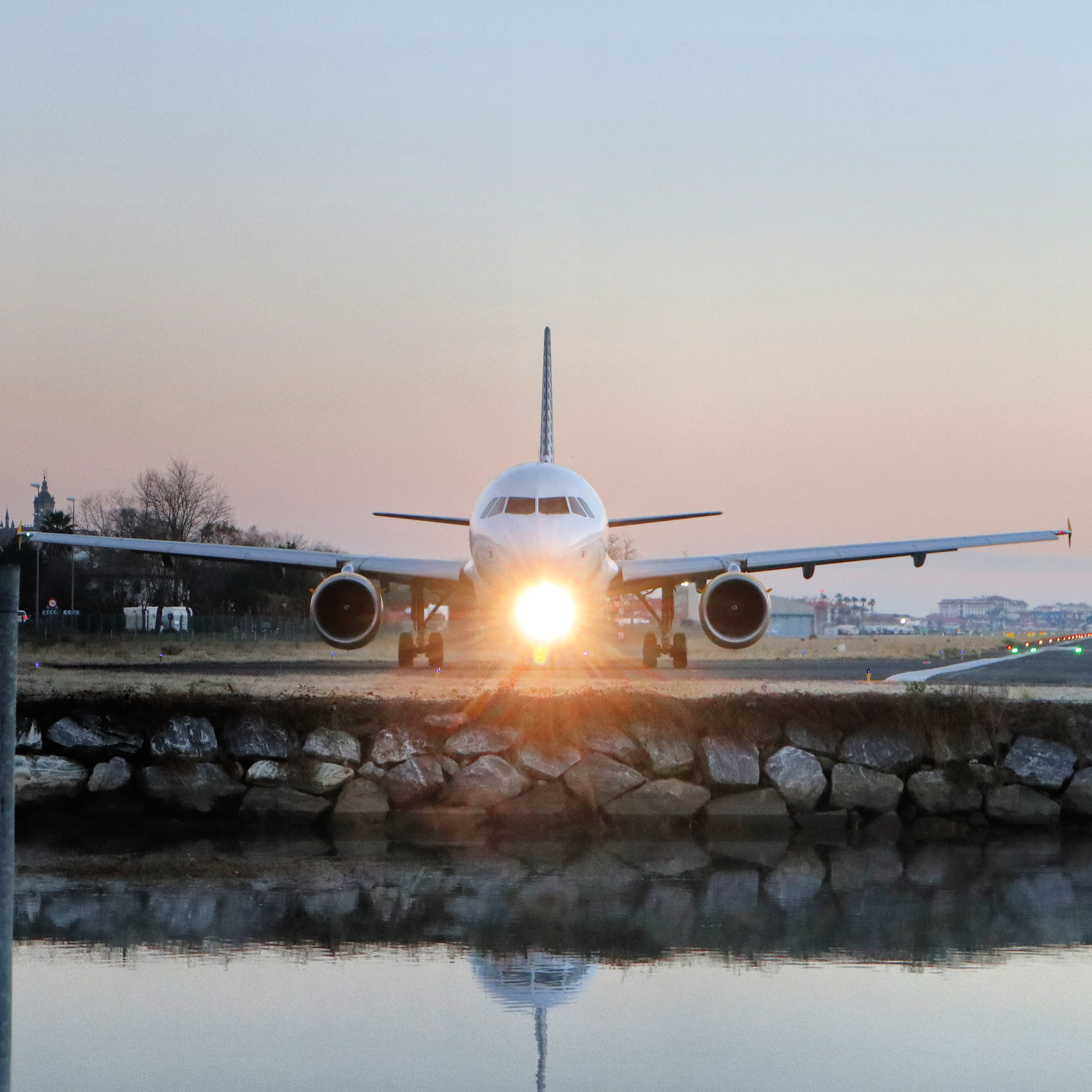 Un Airbus A319 de Iberia en la cabecera 04